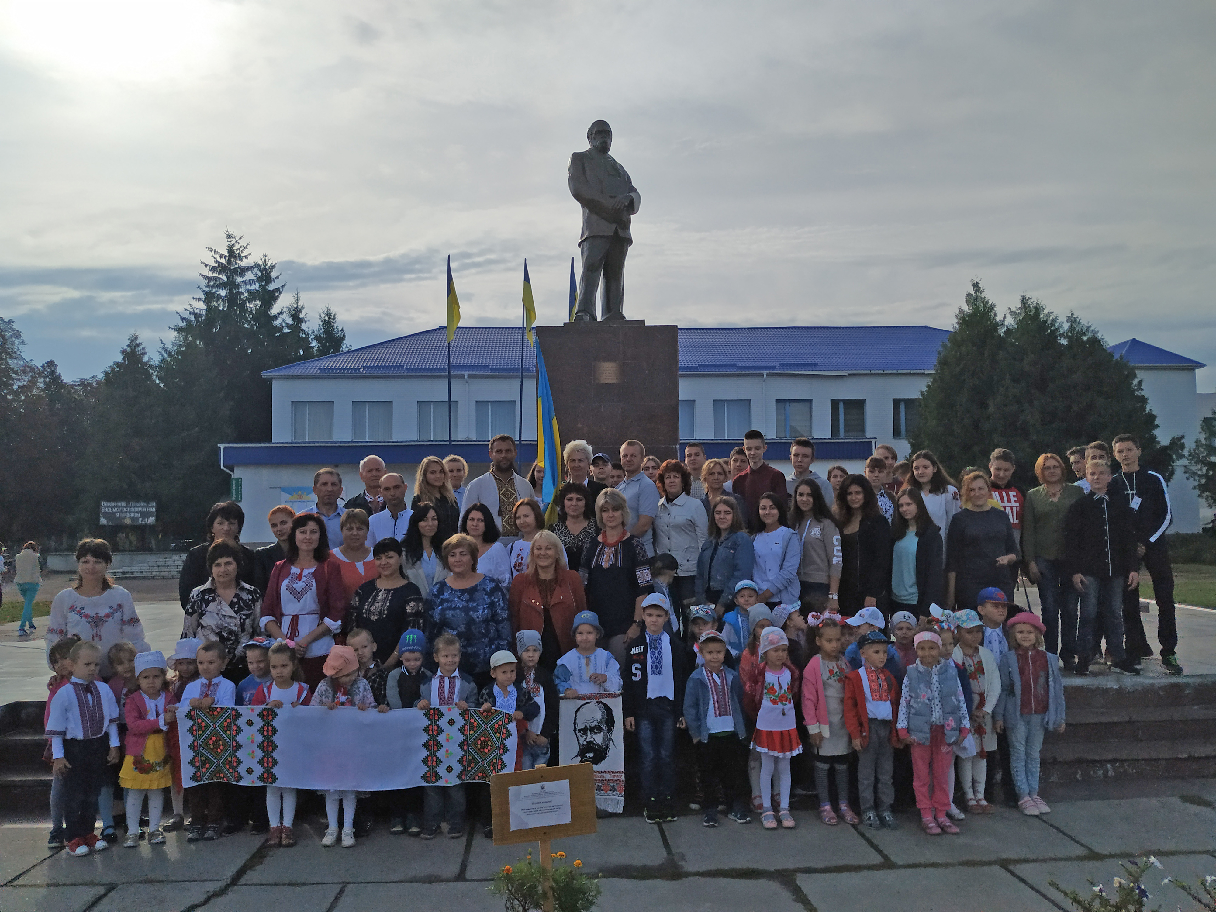 ТД 2-08 Варва